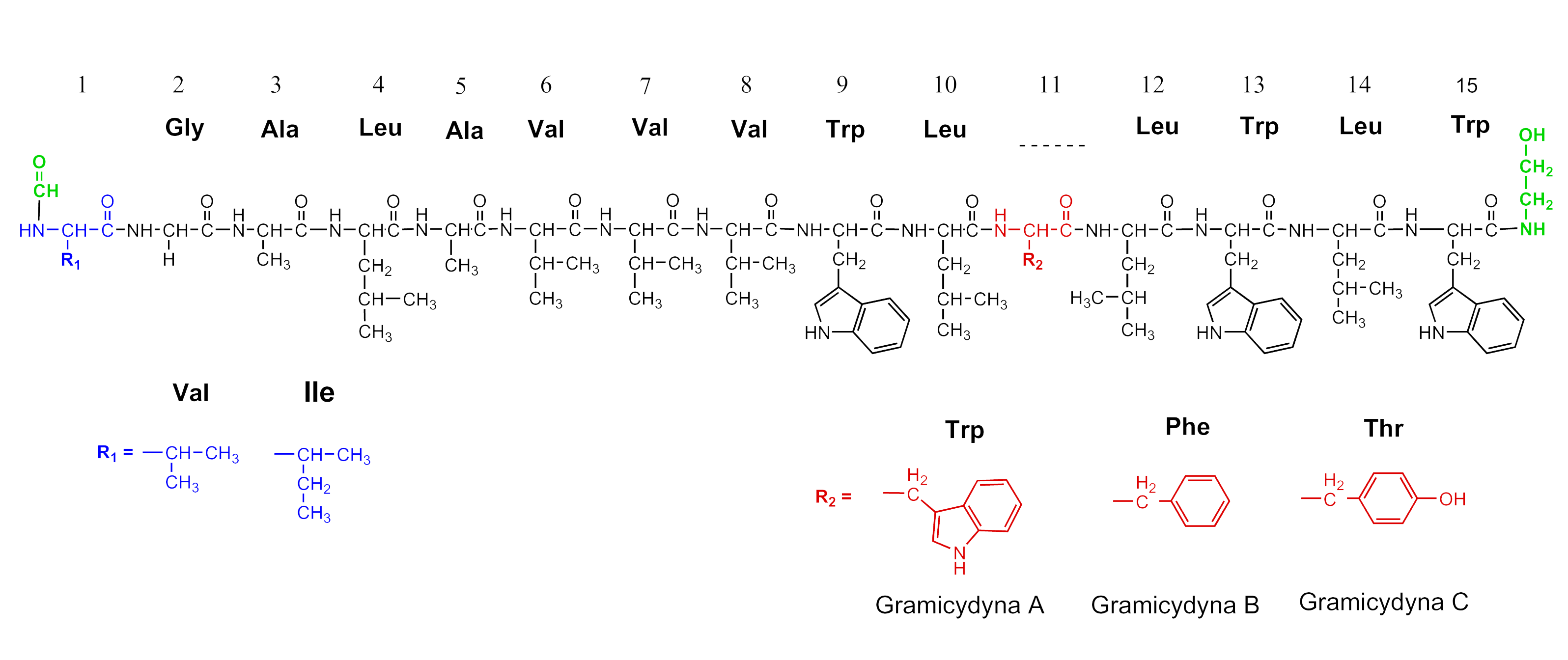 Sekwencja aminokwasów w cząsteczce gramicydyny A, B i C